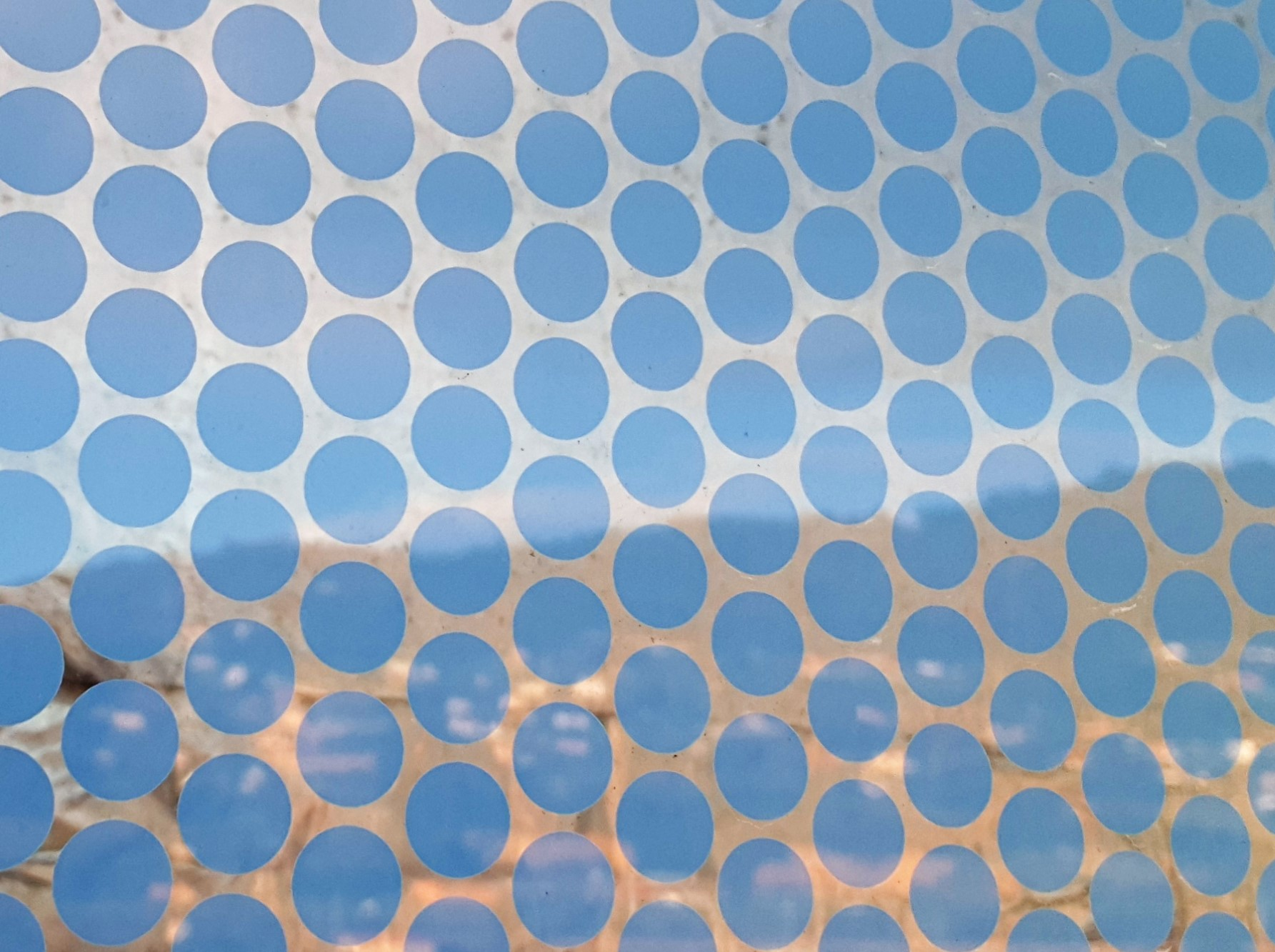 Conjunto MonteNuño en Oviedo, Asturias, españa. Arquitecto Salvador Perez Arroyo